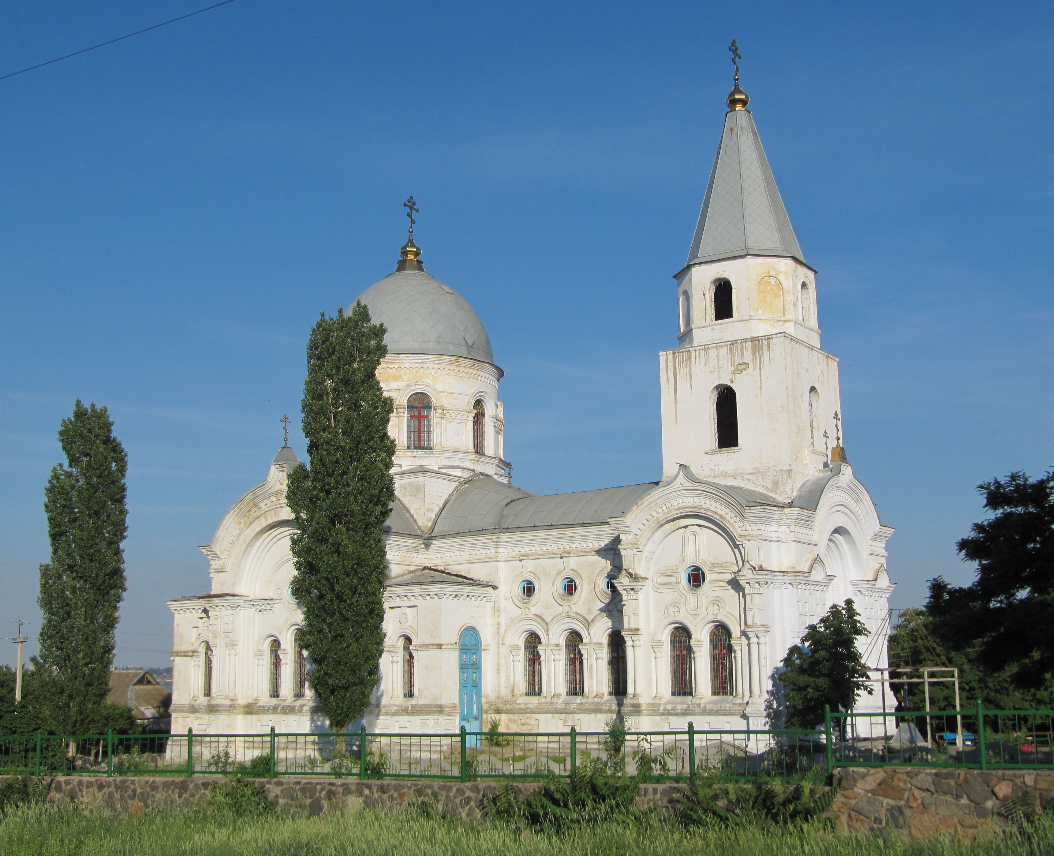 Церква Петра і Павла в мікрорайоні Матвіївка (м. Миколаїв) Миколаївська весна у Вікіпедії